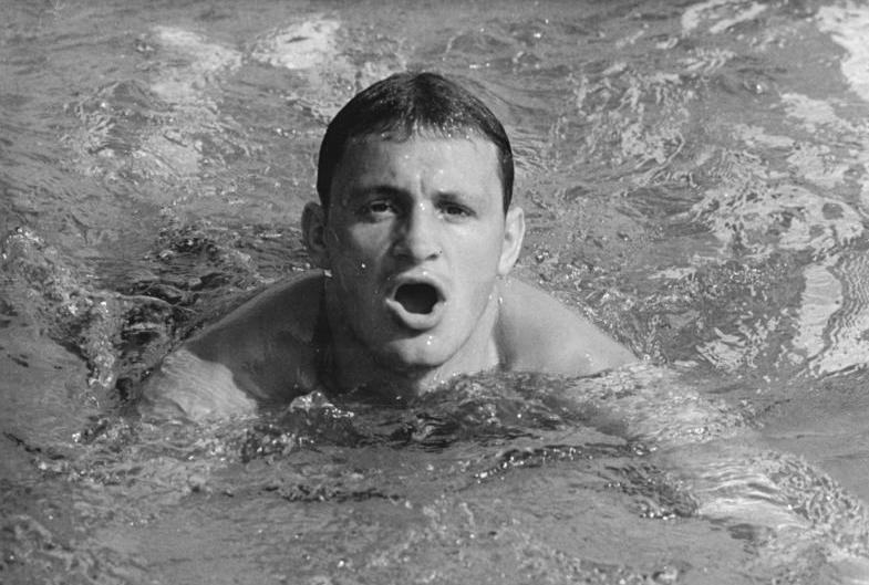 Egon Henninger Zentralbild Schaar 11.11.1967 Leipzig: Egon Henninger schwamm deutschen Rekord Im Leipziger Schwimmstadion fand die Rekordserie der DDR-Schwimmer am 10.11.1967 mit einem neuen deutschen Rekord der DDR über 200 m Brust ihren Abschlu0, den der 27jährige Rostocker Egon Henninger (ASK Vorwärts-Archivfoto) mit 2:29,1 min aufstellte.